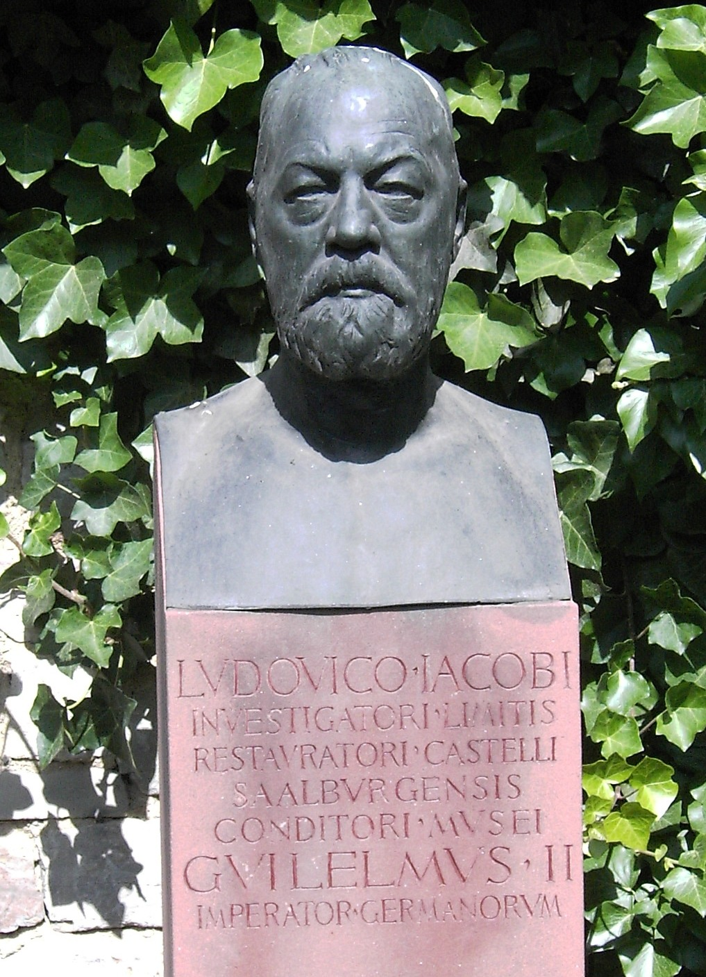 Büste von Louis Jacobi. Ausgestellt in der Saalburg.